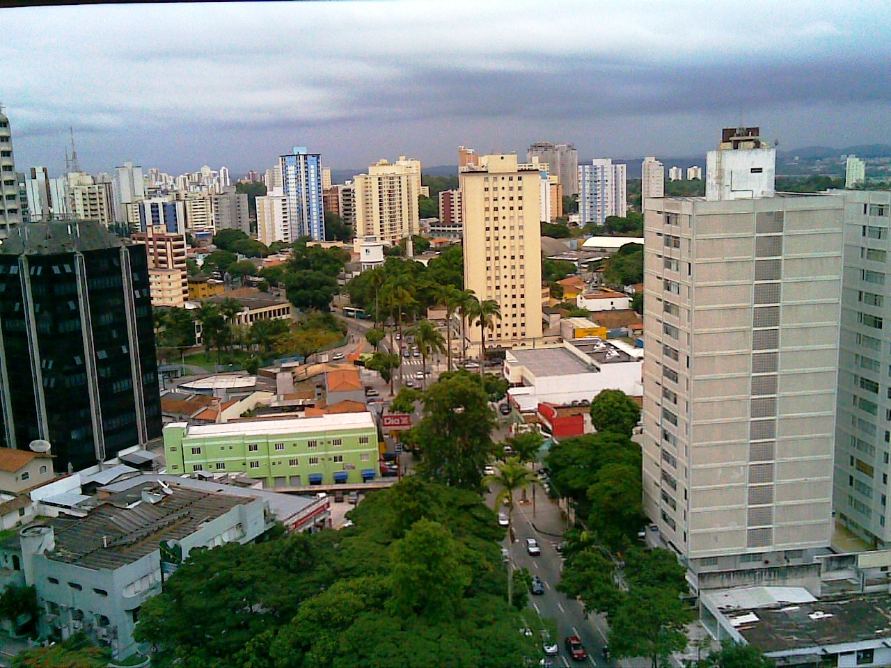 São José dos Campos - Centro e Zona Oeste ao fundo da imagem